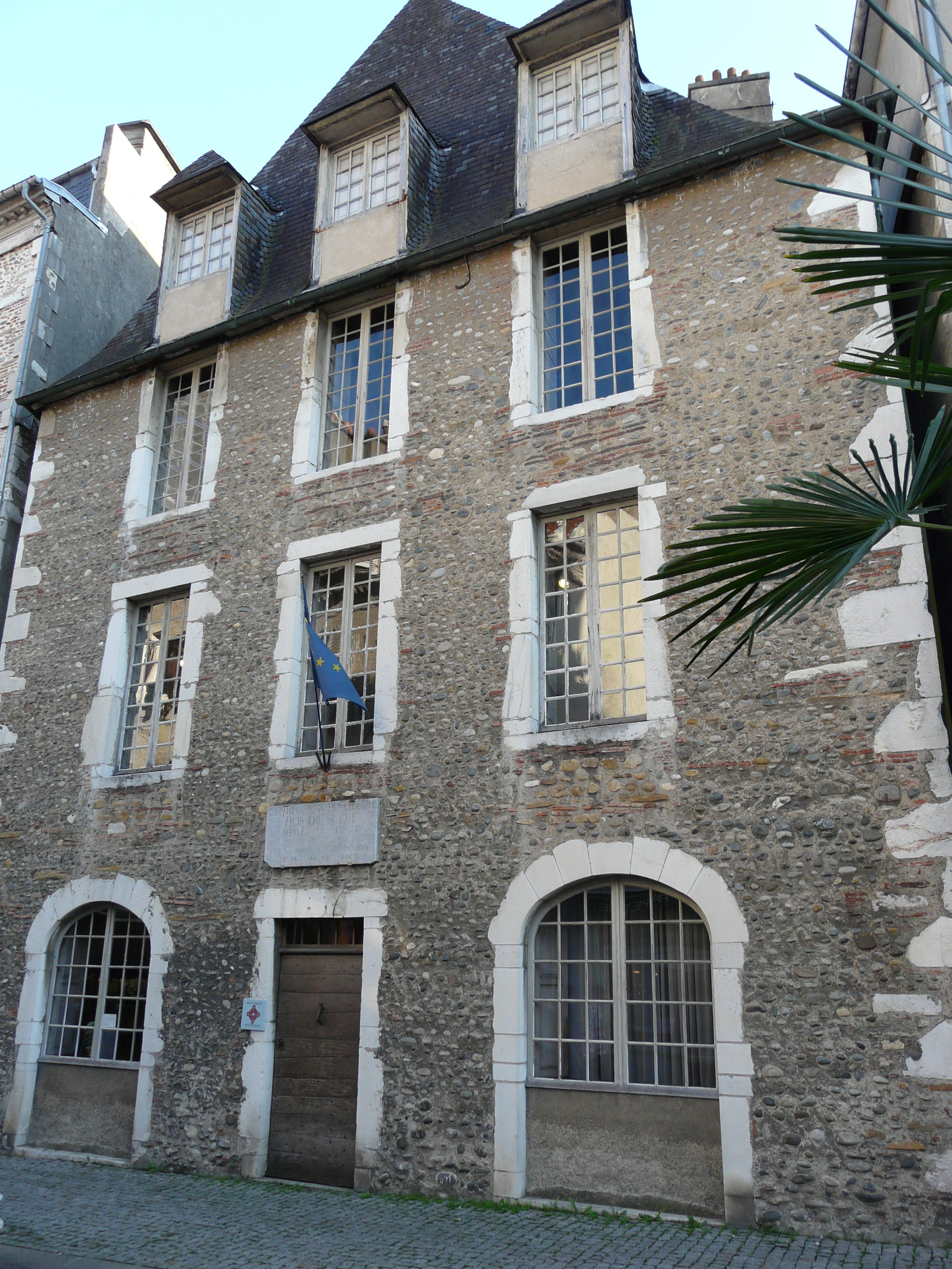 Façade de la maison natale de Bernadotte, 5 rue Bernadotte, Pau, Pyrénées-Atlantiques, France.